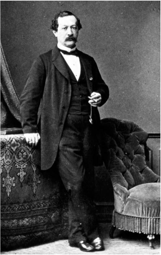 Viktor Ritter Ofenheim von Ponteuxin, 1820-1886